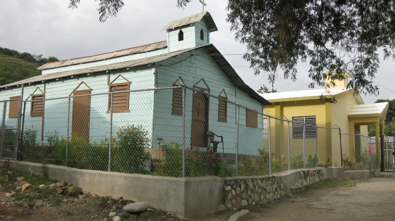 Iglesia Catolica de Arroyo Cano